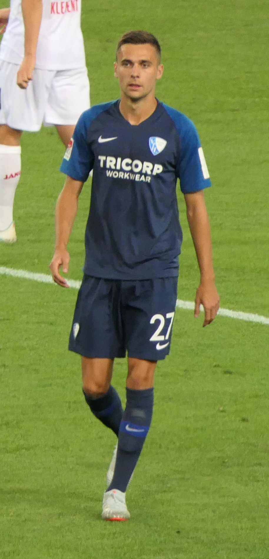 Der Fussballprofi Miloš Pantović im Trikot vom VfL Bochum beim Auswärtsspiel gegen den VfB Stuttgart am 02.09.2019.